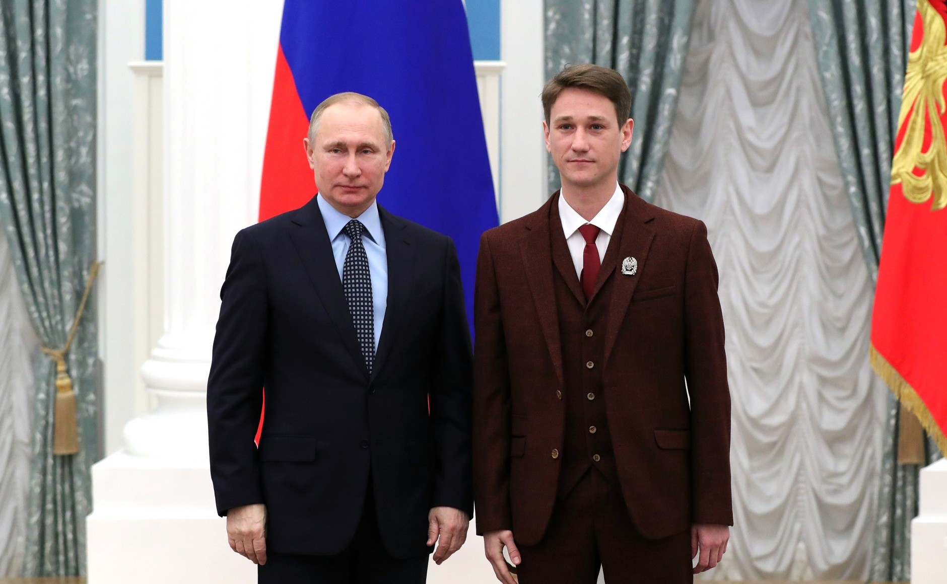 Премии Президента для молодых деятелей культуры 2016 года удостоен актёр Антон Шагин